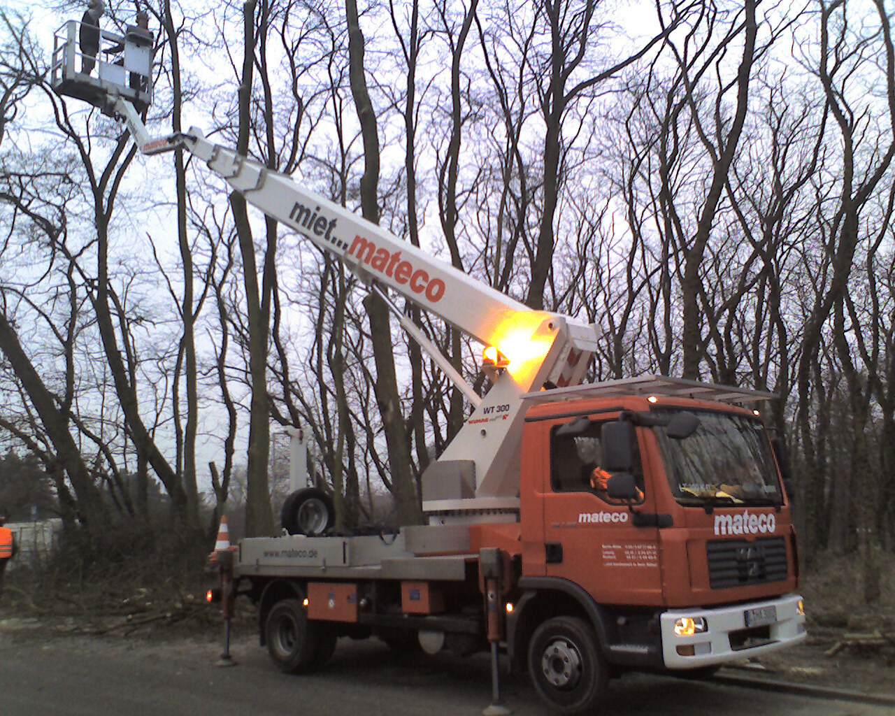 neuer Wumag elevant WT 300